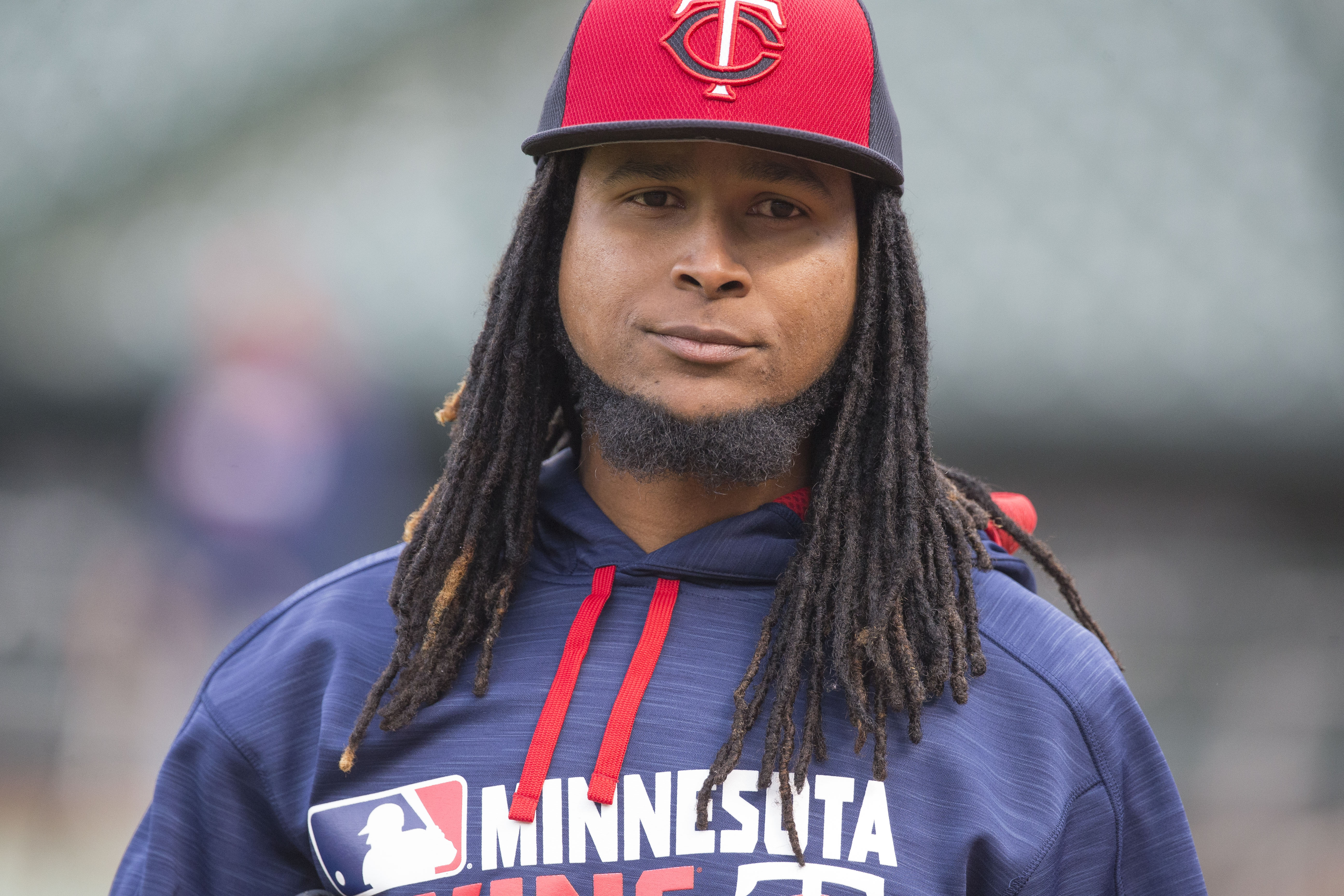 Ervin Santana